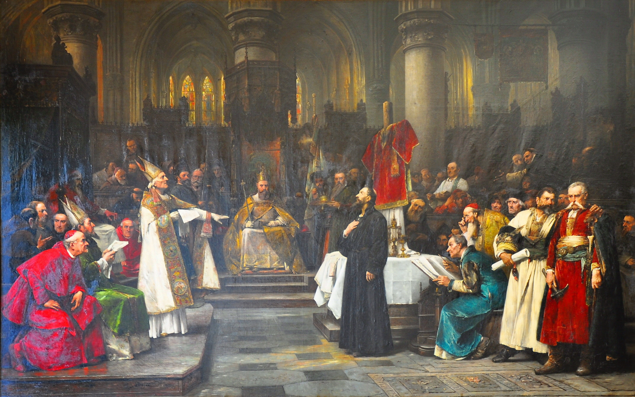 Výjev z jednání Kostnického koncilu s Mistrem Janem Husem.